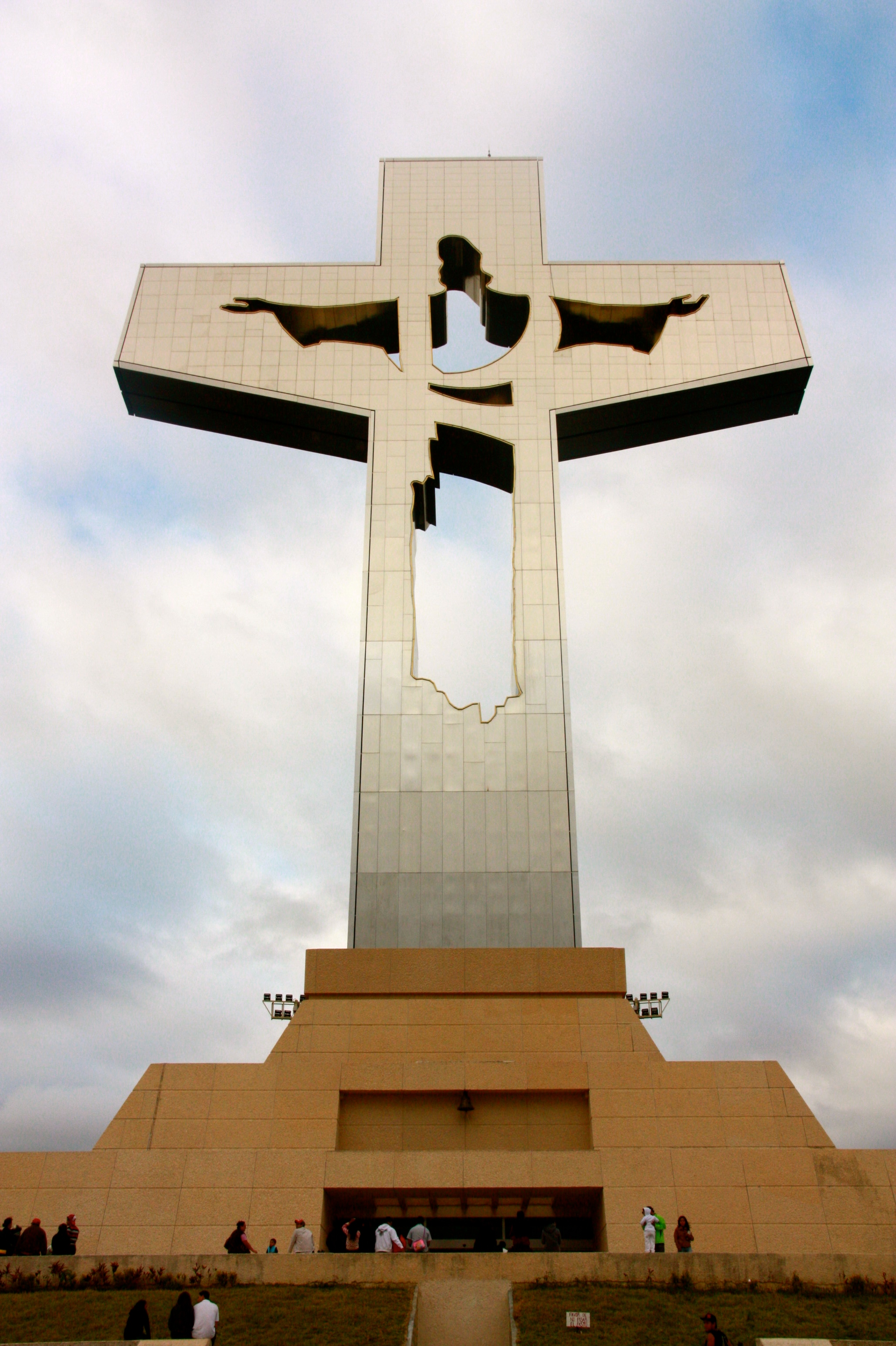 Cristo de Copoya en Chiapas, México.